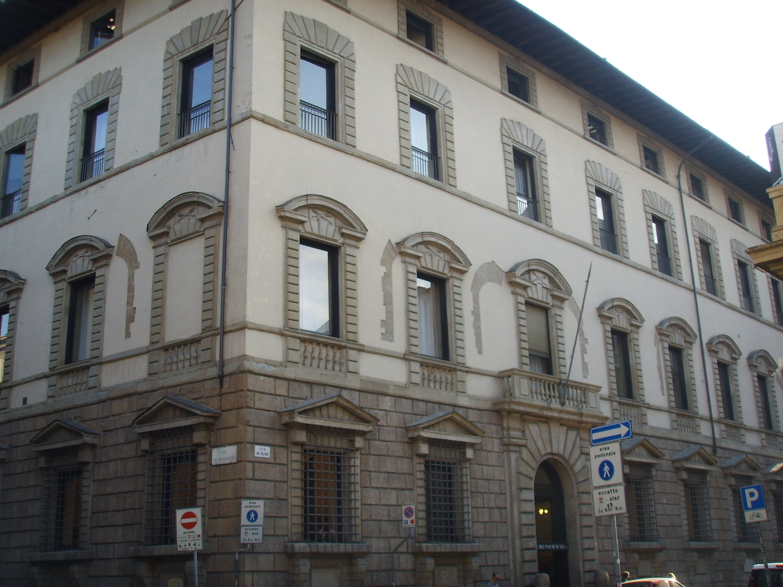 Palazzo Orlandini del Beccuto